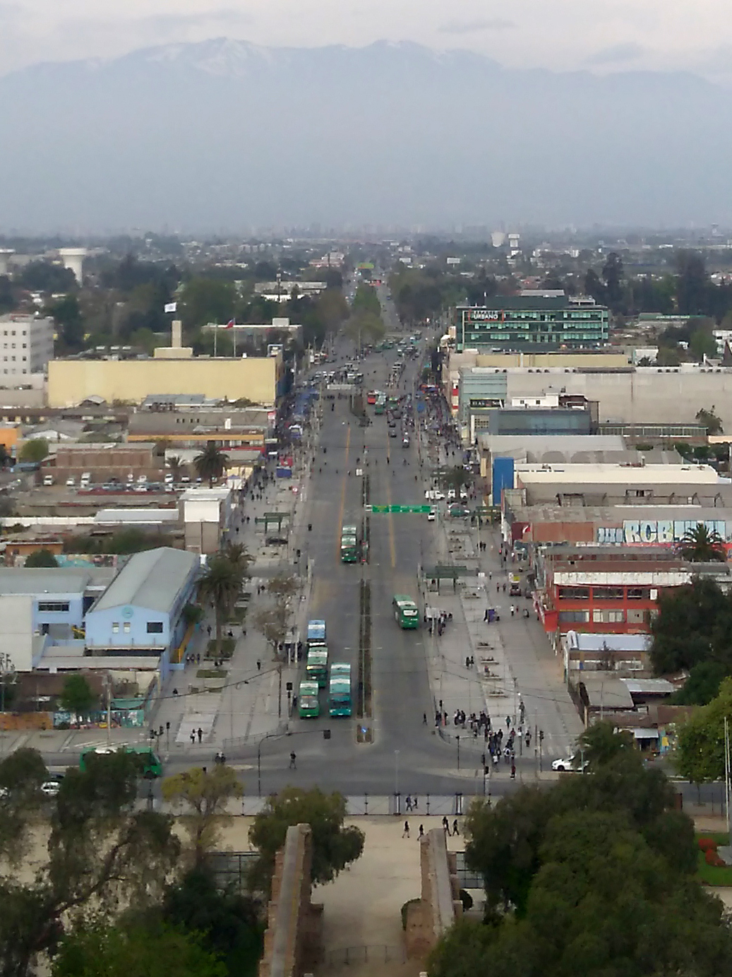 Imagen panorámica de la avenida 5 de Abril, en la comuna de Maipú, tomada desde el mirador del Templo Votivo.